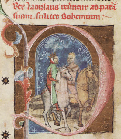 Václav III. cesta domů